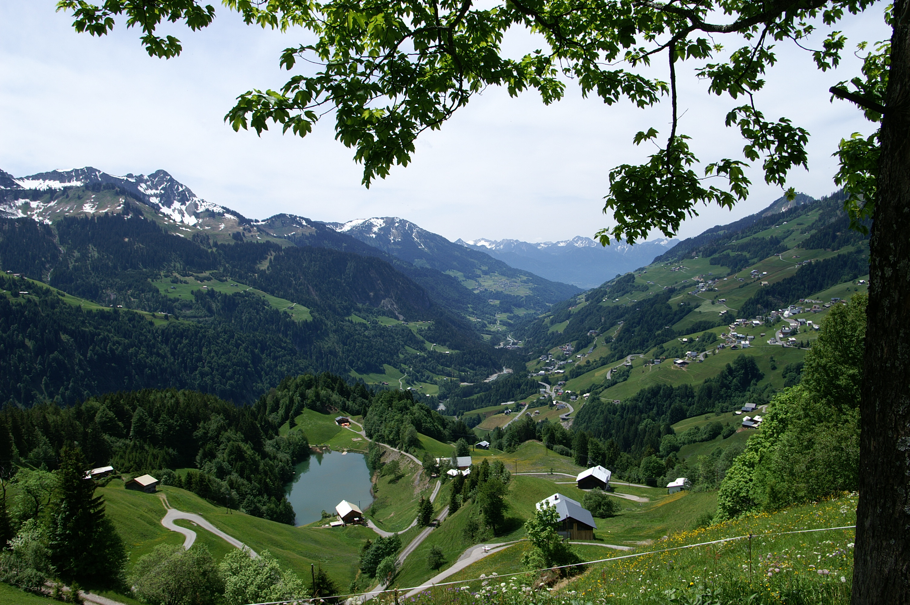 Blick vom Seewald am Fuße der Blasenka ins Große Walsertal mit den Gemeinden Fontanella, Sonntag (Vorarlberg) und Raggal in Vorarlberg. Im Vordergrund der Seewaldsee. Veröffentlicht: Georg Kessler in "Freizeit im Ländle, Die schönsten Ausflugziele in Vorarlberg" ISBN 978-3-7022-3068-5 2010.